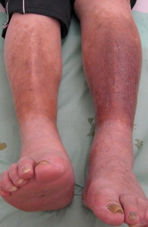 Promene na potkolenicama kod dijabetesne vaskulopatie, Autor dr M.Dimić, Niš 2009.